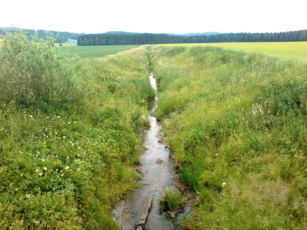 Svenskebekken i Aurskog-Høland kommune.